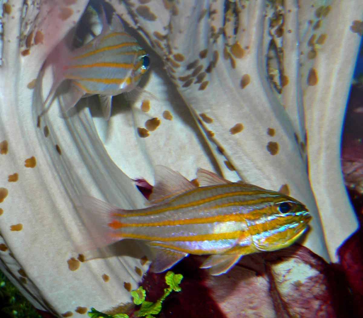 Apogon cyanosoma at Birch Aquarium